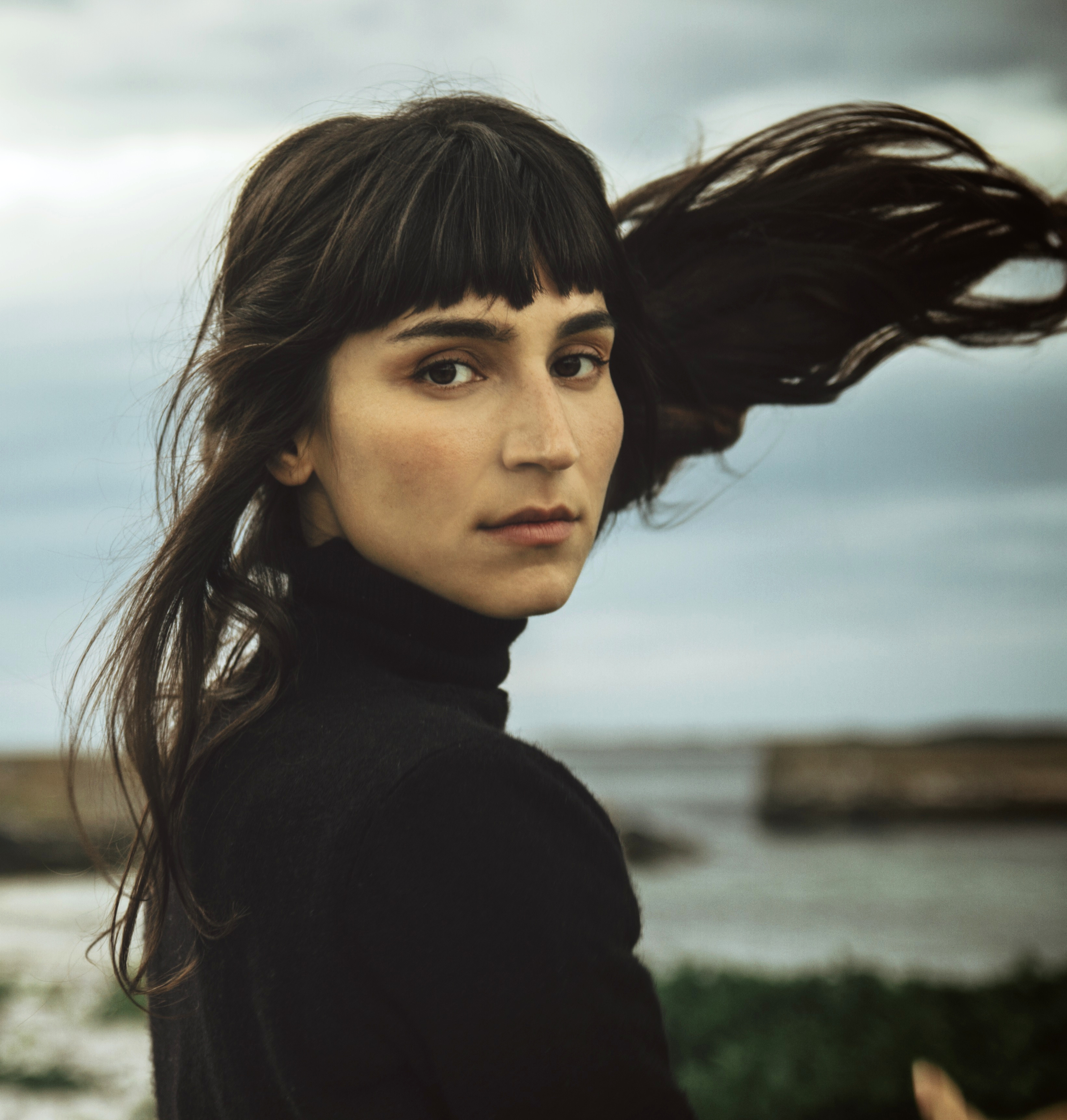 Artisten Laleh.